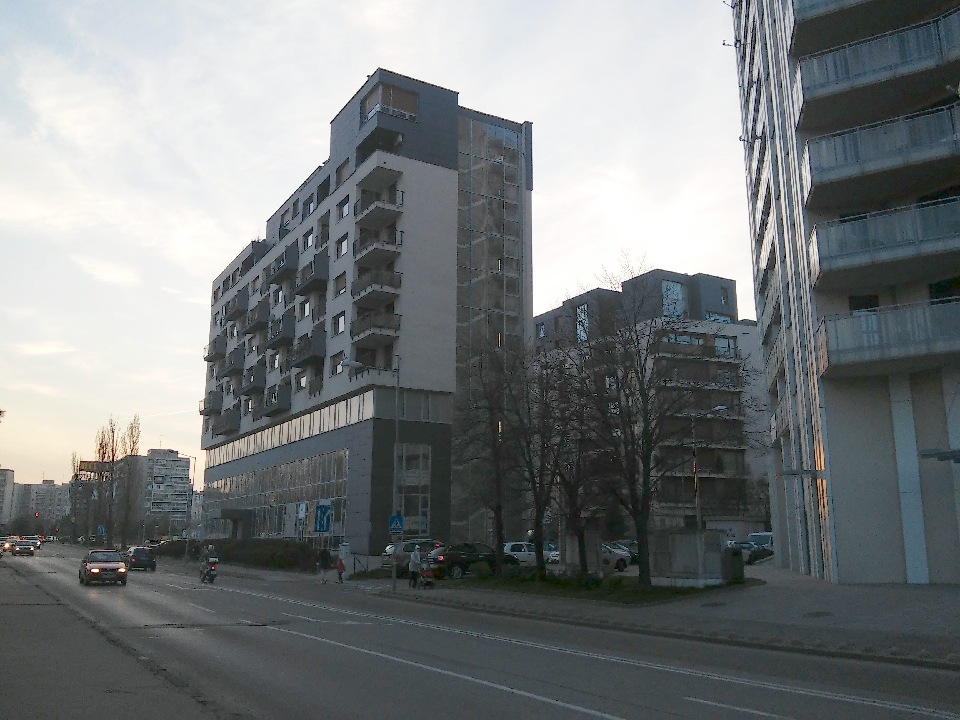 Drieňová, Bratislava